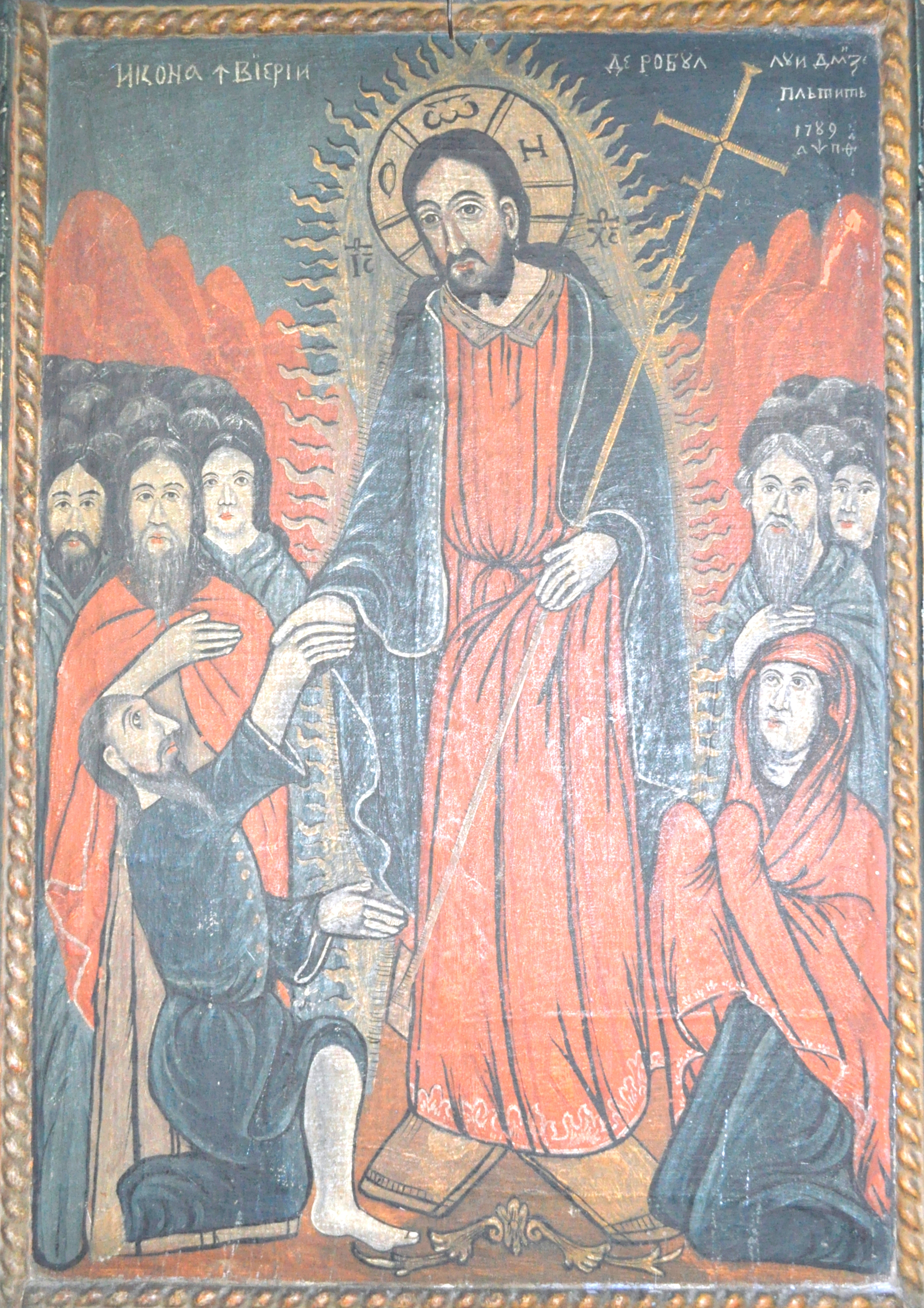 Biserica de lemn “Învierea Domnului” din Cubleșu, județul Sălaj